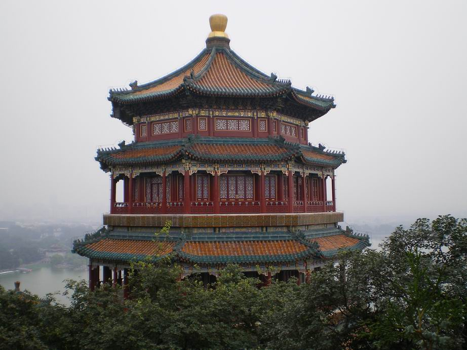 ארמון הקיץ, בייג'ינג רישיון נוצר על ידי משתמש:Gsella